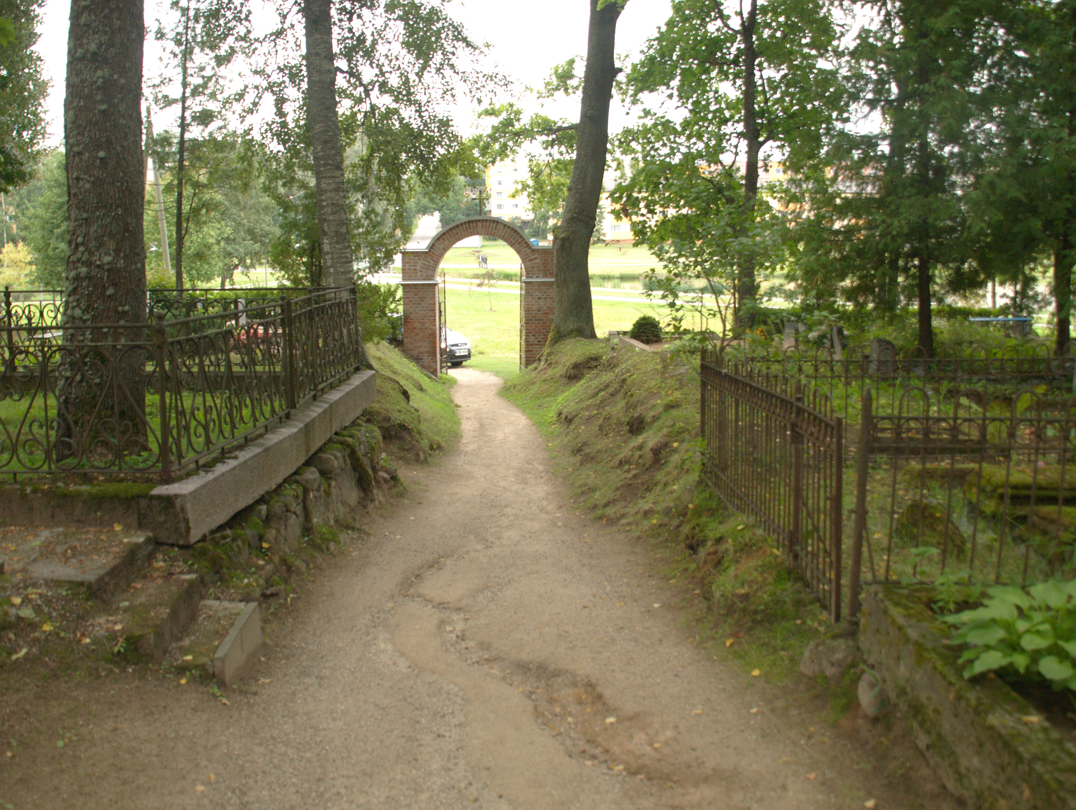 Valga Tartu tänava kalmistu